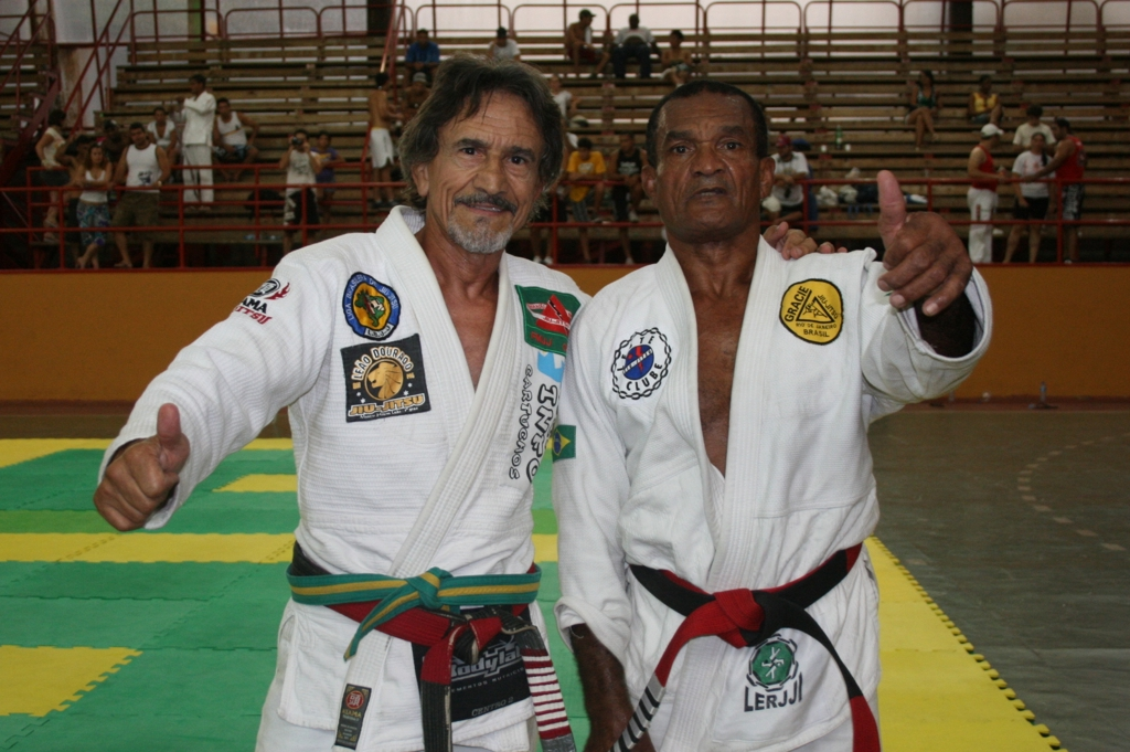 Mestres Hilton Leão e Célio Caneca durante o Campeonato Brasileiro Interclubes de Jiu-Jitsu realizado na cidade de Ipatinga em 2009.